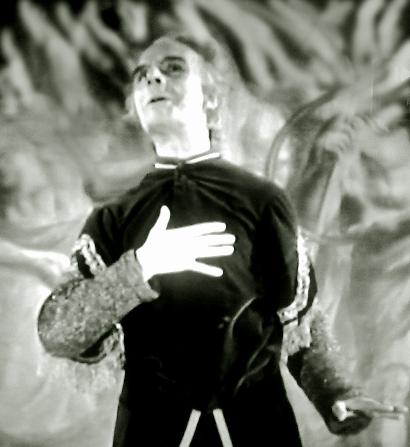 Sergio Tofano in una scena di "Giù il sipario" (Matarazzo, 1940)